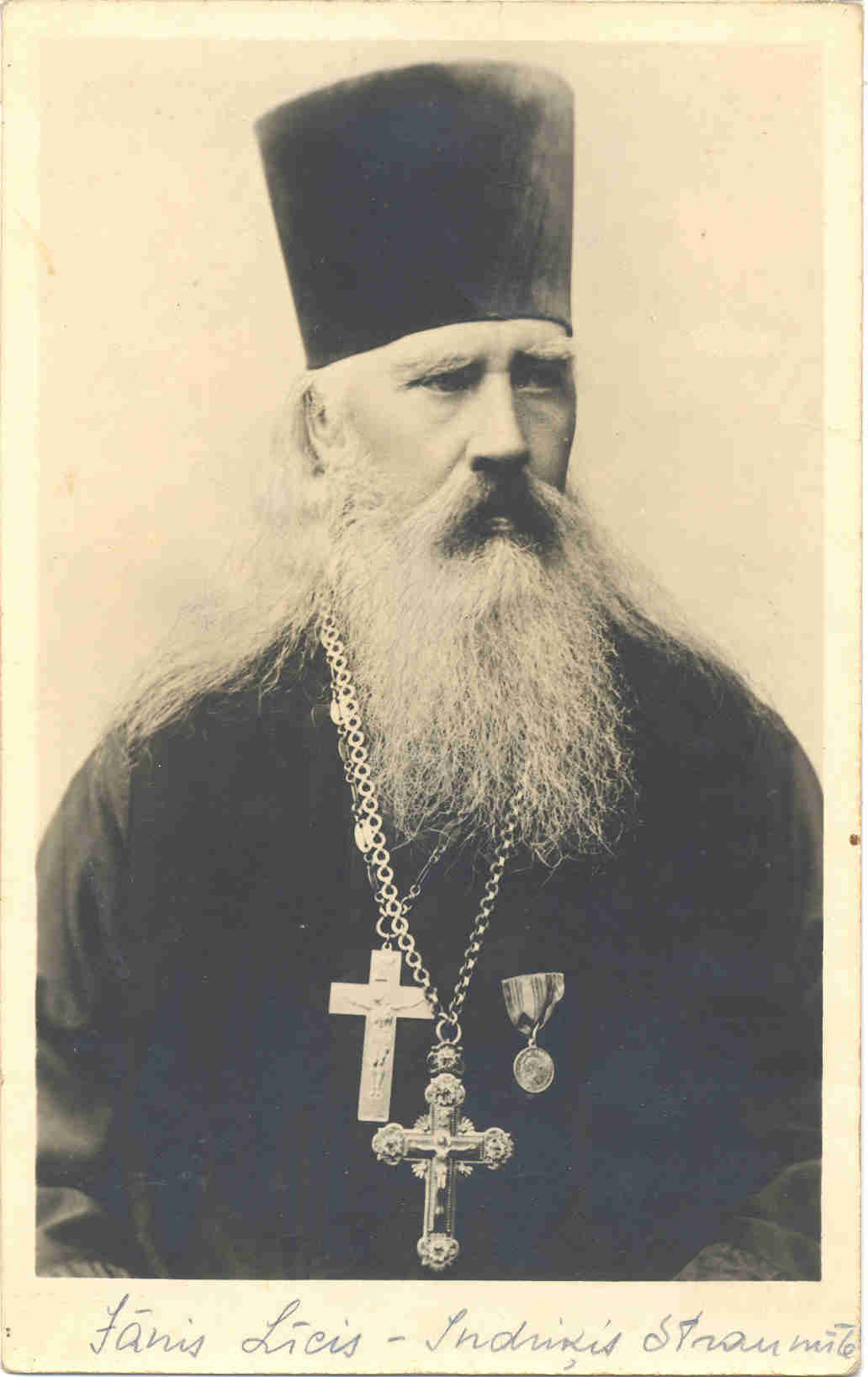 Porträt von Jānis Līcis mit dessen Pseudonym Indriķis Straumīte aus dem digitalen Langzeitarchiv der Lettischen Nationalbibliothek - [1] . Dort findet sich die Erklärung, dass das Bild nicht urheberrechtlich geschützt ist.